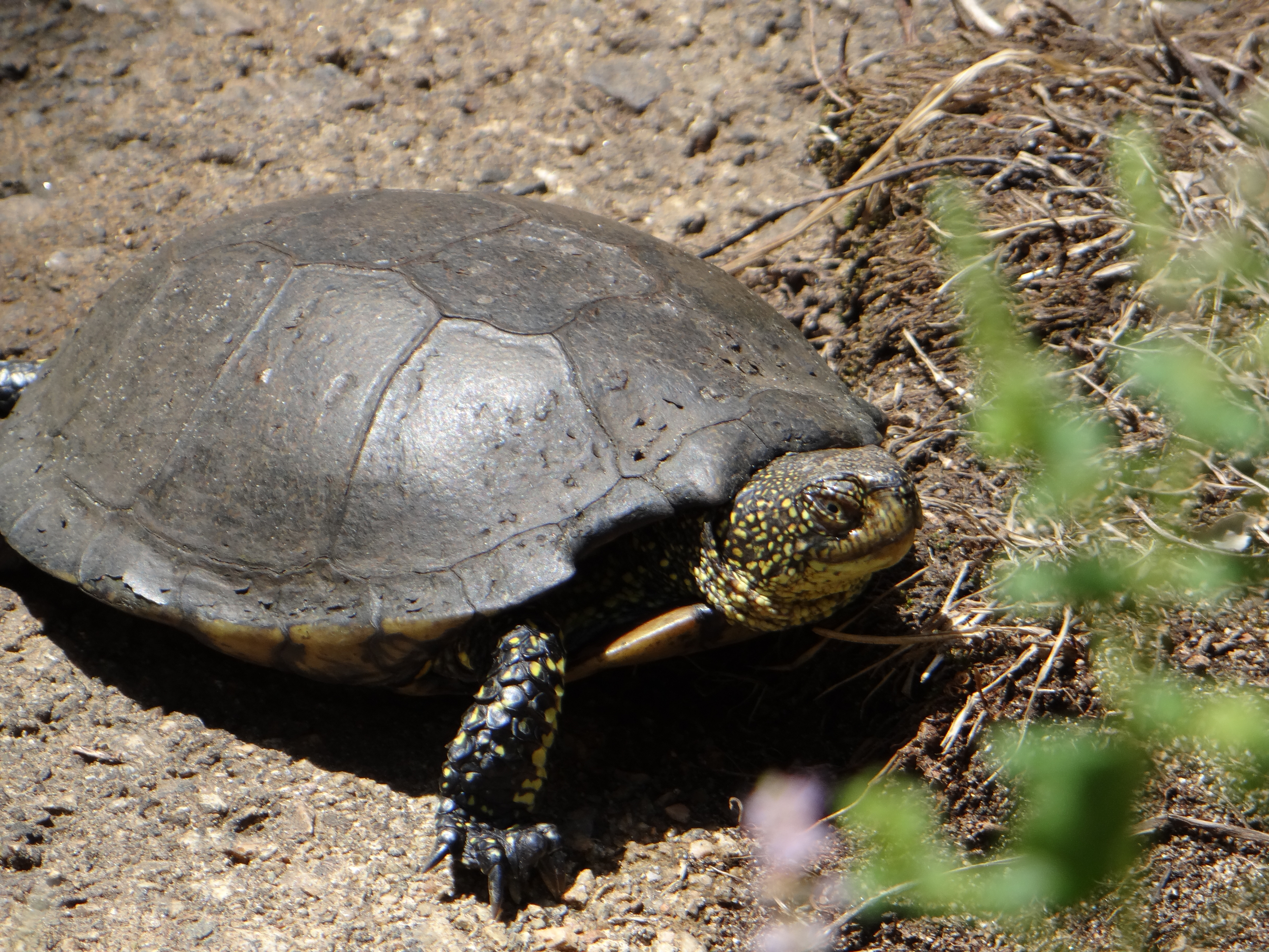 Cistude d'Europe (Emys orbicularis) au parc A Cupulatta, Corse